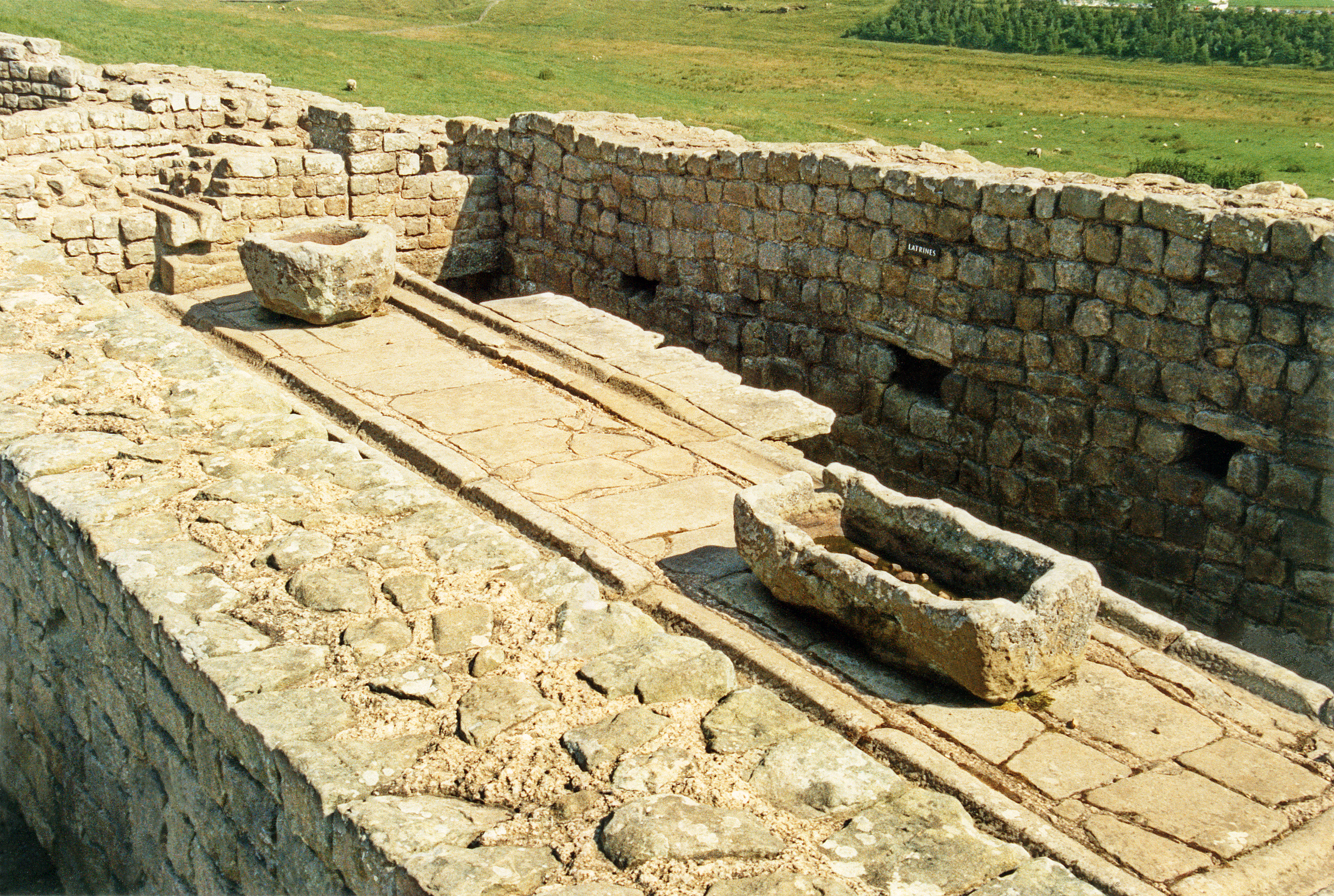 Die zweiphasig ausgebaute steinerne Mannschaftstoilette nahe dem südöstlichen Eckturm des Kastells Housesteads, Hadrianswall, Nordengland. Die aus Holz errichteten Sitzreihen sind vergangen. Photographiert mit einer Minolta X 700, Tokina 28-70-mm-Objektiv und 21-DIN-Film.